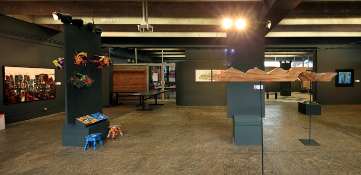 Celebración del 40 aniversario de la Escuela de Arquitectura de la Universidad de Costa Rica, del 3 al 18 de octubre del 2011, con múltiples actividades, entre ellas destacó la exposición de escultura y pintura hecha por arquitectos de la Escuela, entre ellos "Felo" García, Ibo Bonilla y Gilberth Vargas.